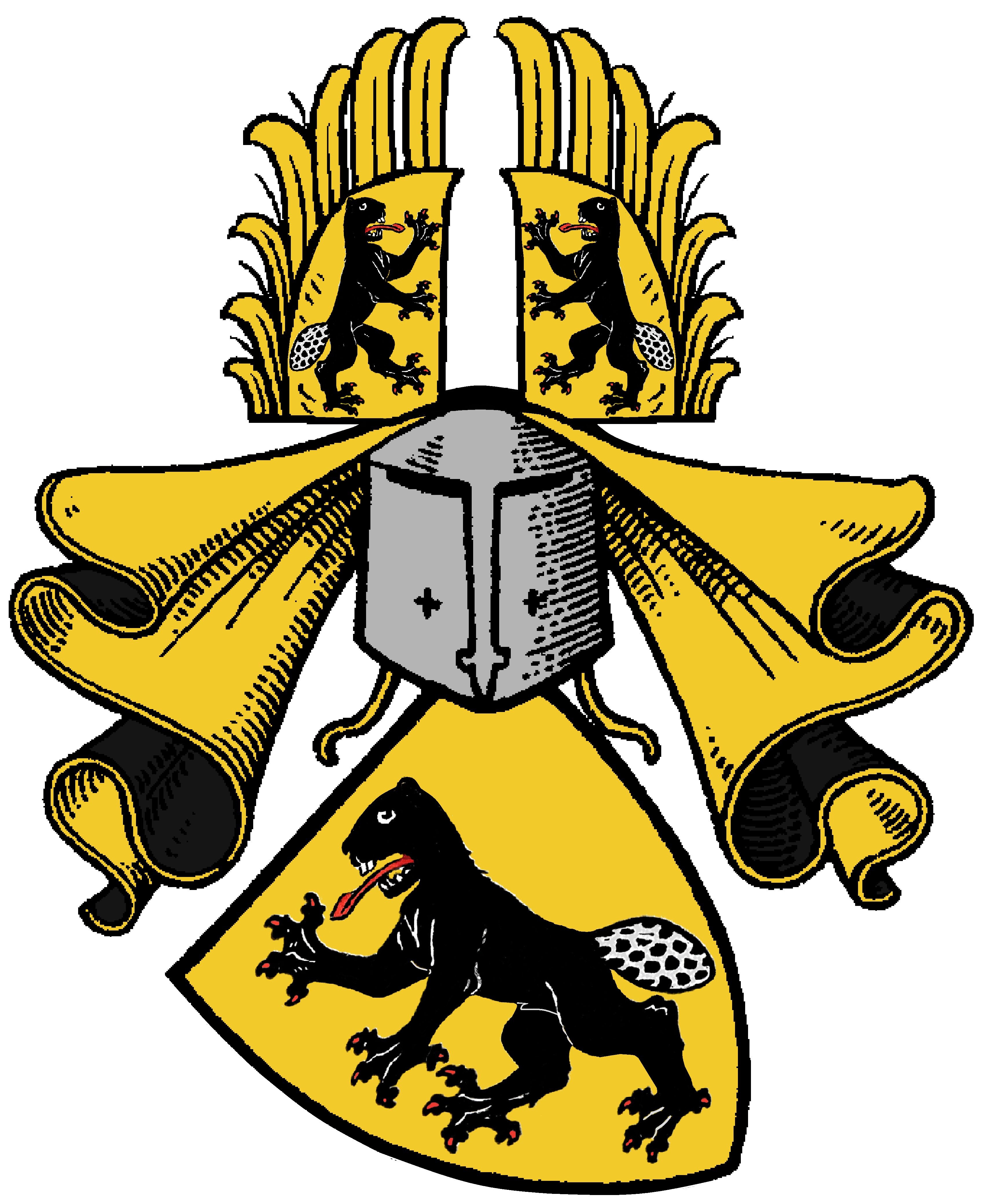 Stammwappen der von Bibra (ältestes erhaltenes Siegel: Berthold von Bibra, 1217)